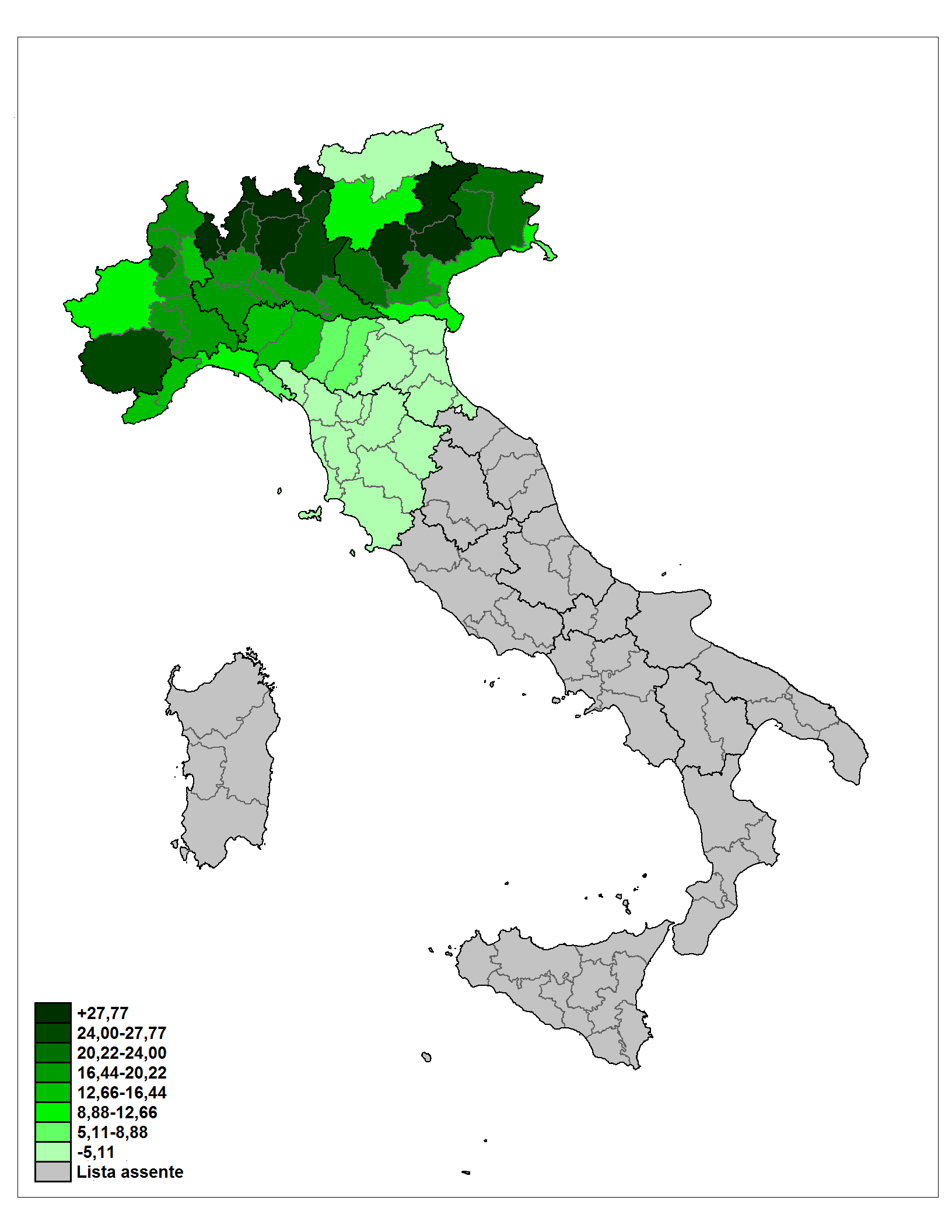 Distribuzione del voto alla Lega Nord nelle elezioni politiche italiane del 1994.